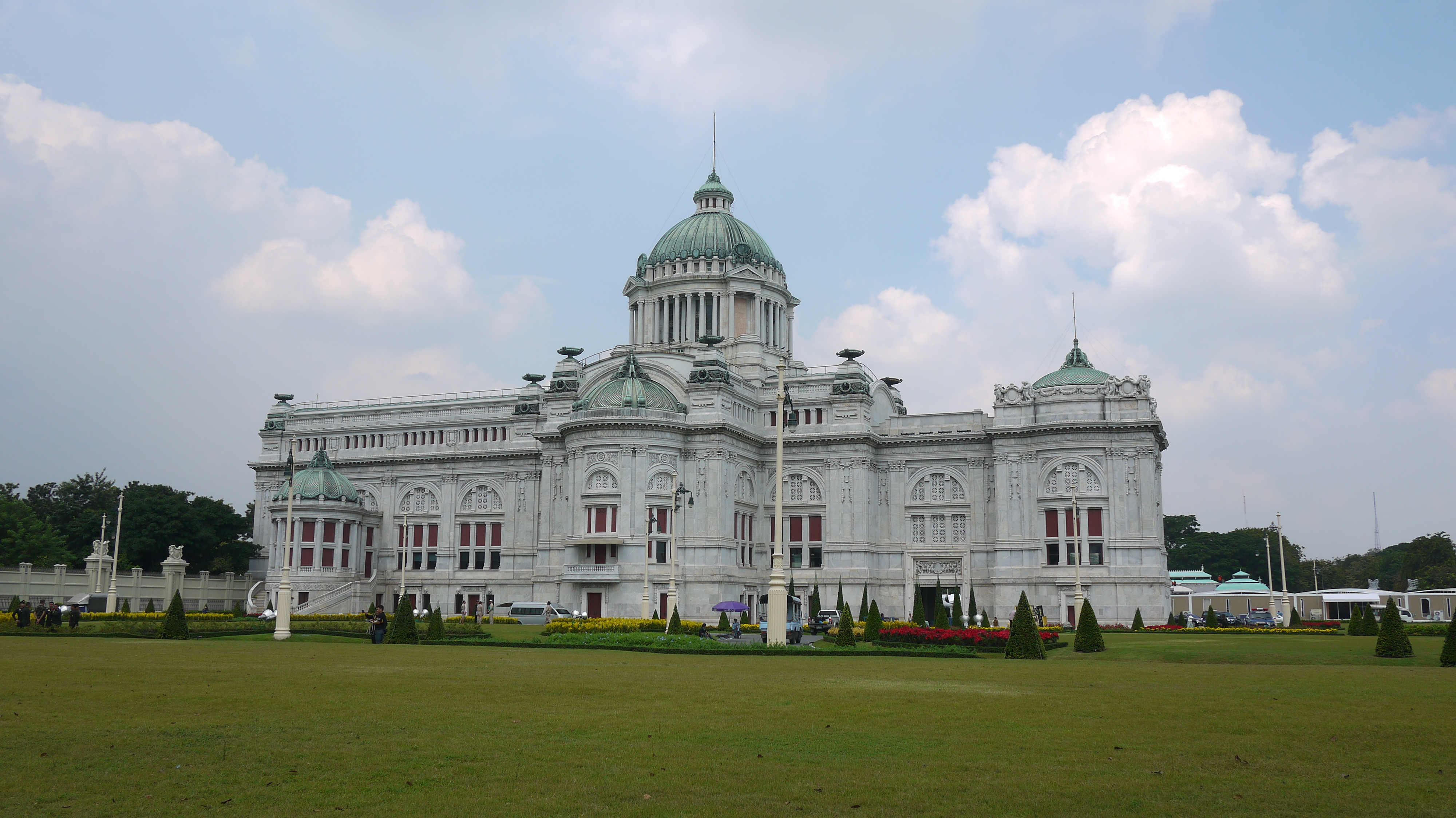 พระที่นั่งอนันตสมาคม [Ananta Samakhom Throne Hall]